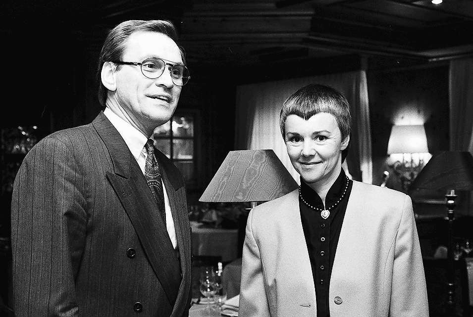 Freiburg im Breisgau: Frau Krone-Schmalz, TV-Korrespondentin, mit Roland Burtsche